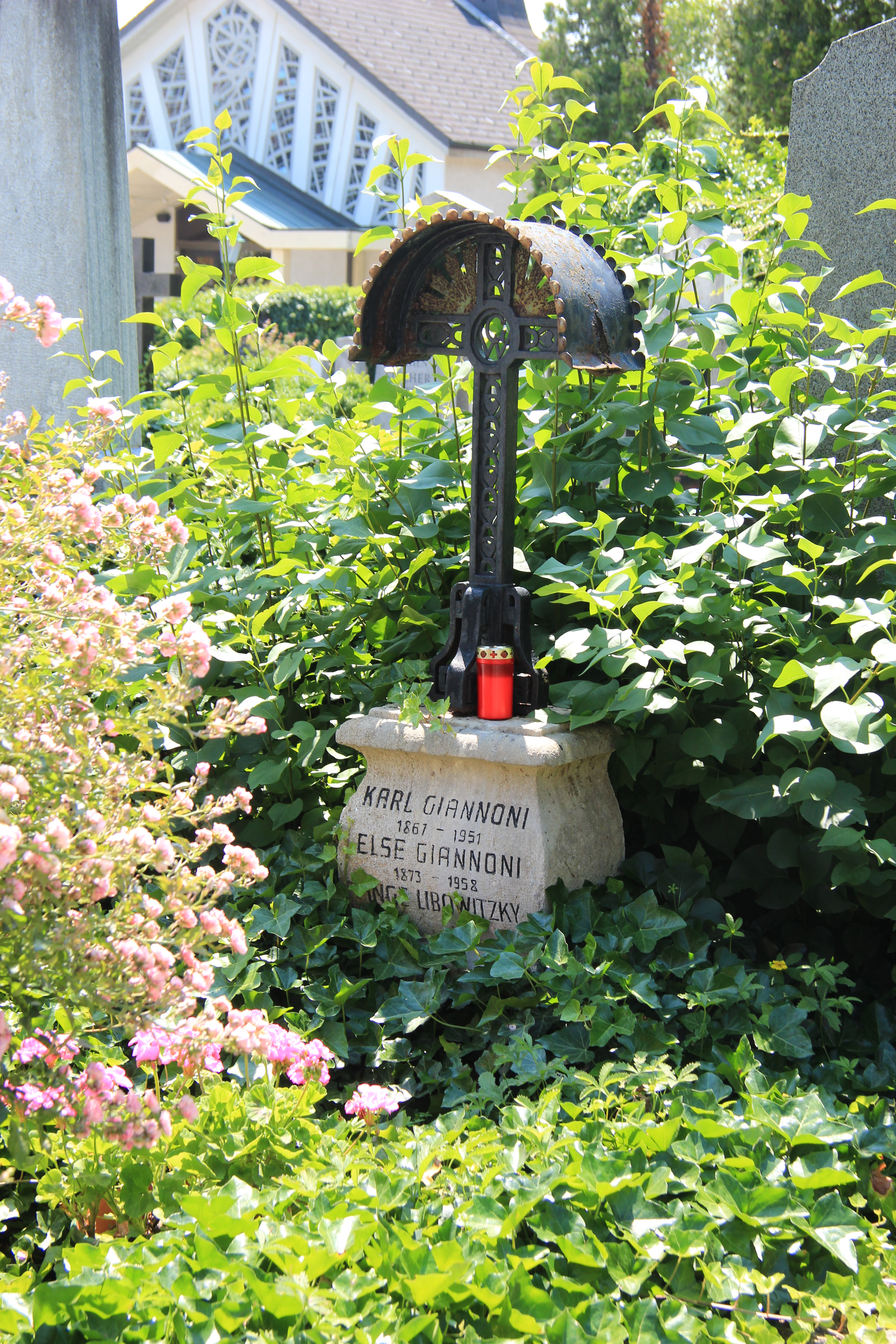 Grab von Karl Giannoni und Gattin am Friedhof Hinterbrühl